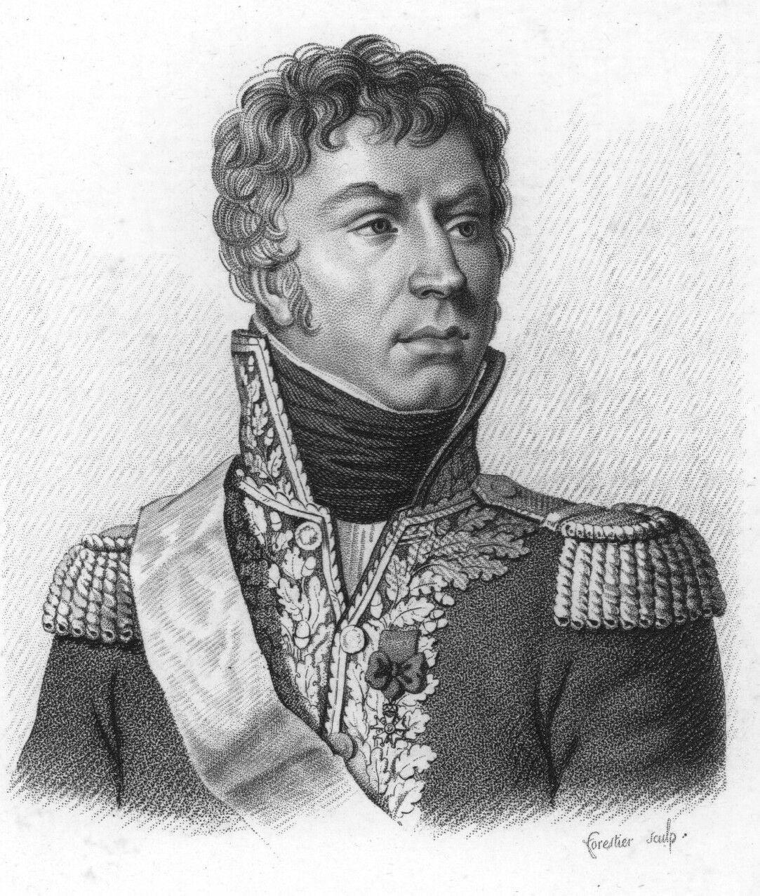 Général Jean-Louis-Ebénézer Reynier